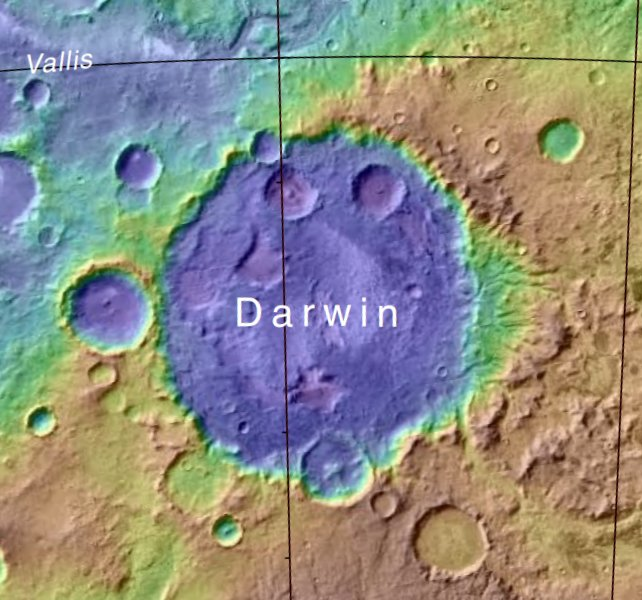 Cráter marciano Darwin ( THEMIS IR Day mosaic by ASU. MOLA)